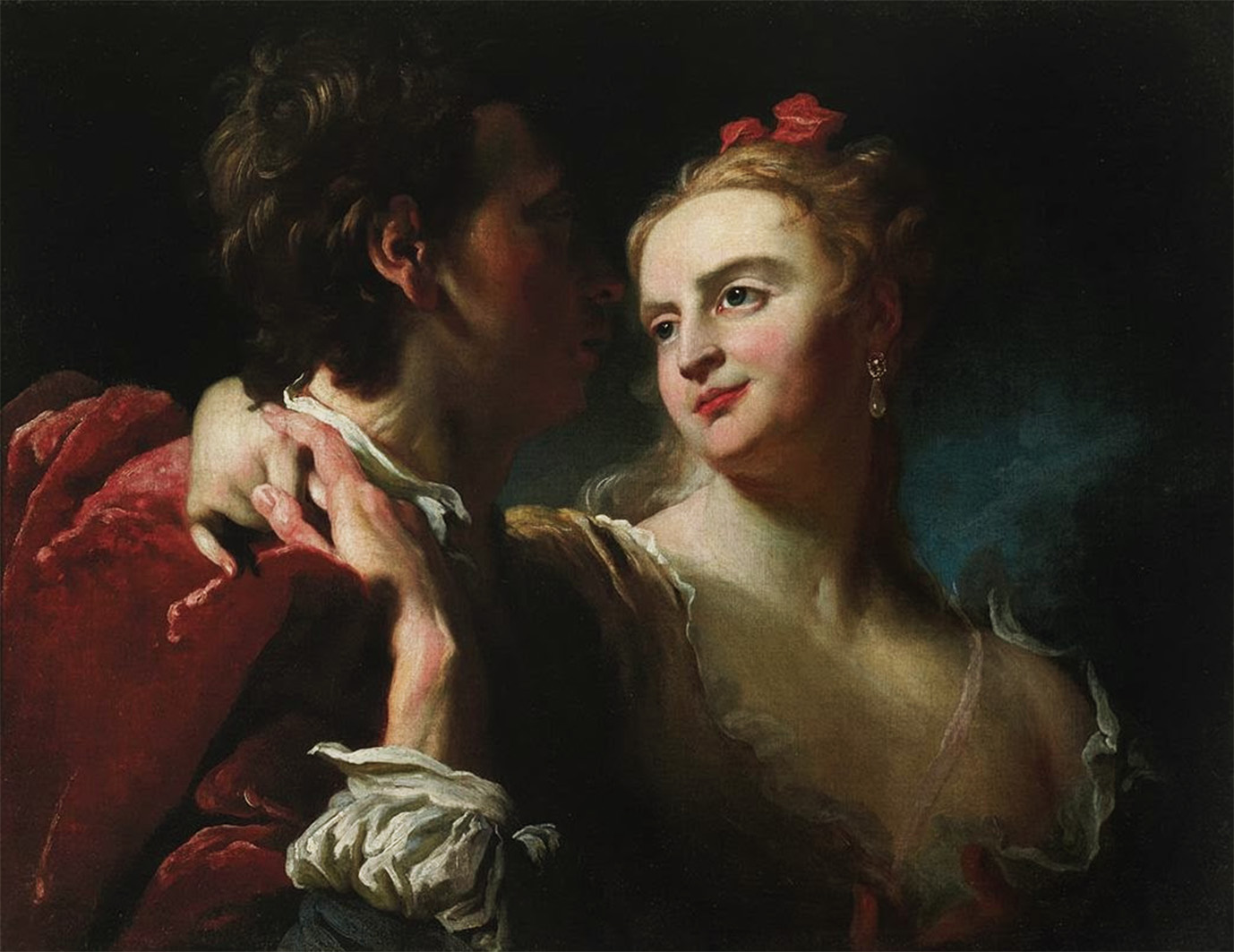 Pierre Louis Goudreaux. Loving Glancelabel QS:Len,"Pierre Louis Goudreaux. Loving Glance" label QS:Luk,"П'єр Луї Гудро «Закоханий погляд»"